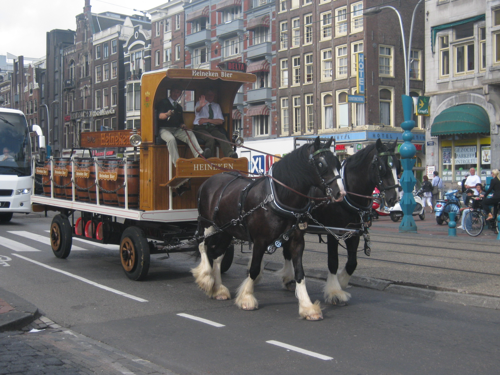 "Heineken Bier" Brewery Carriage